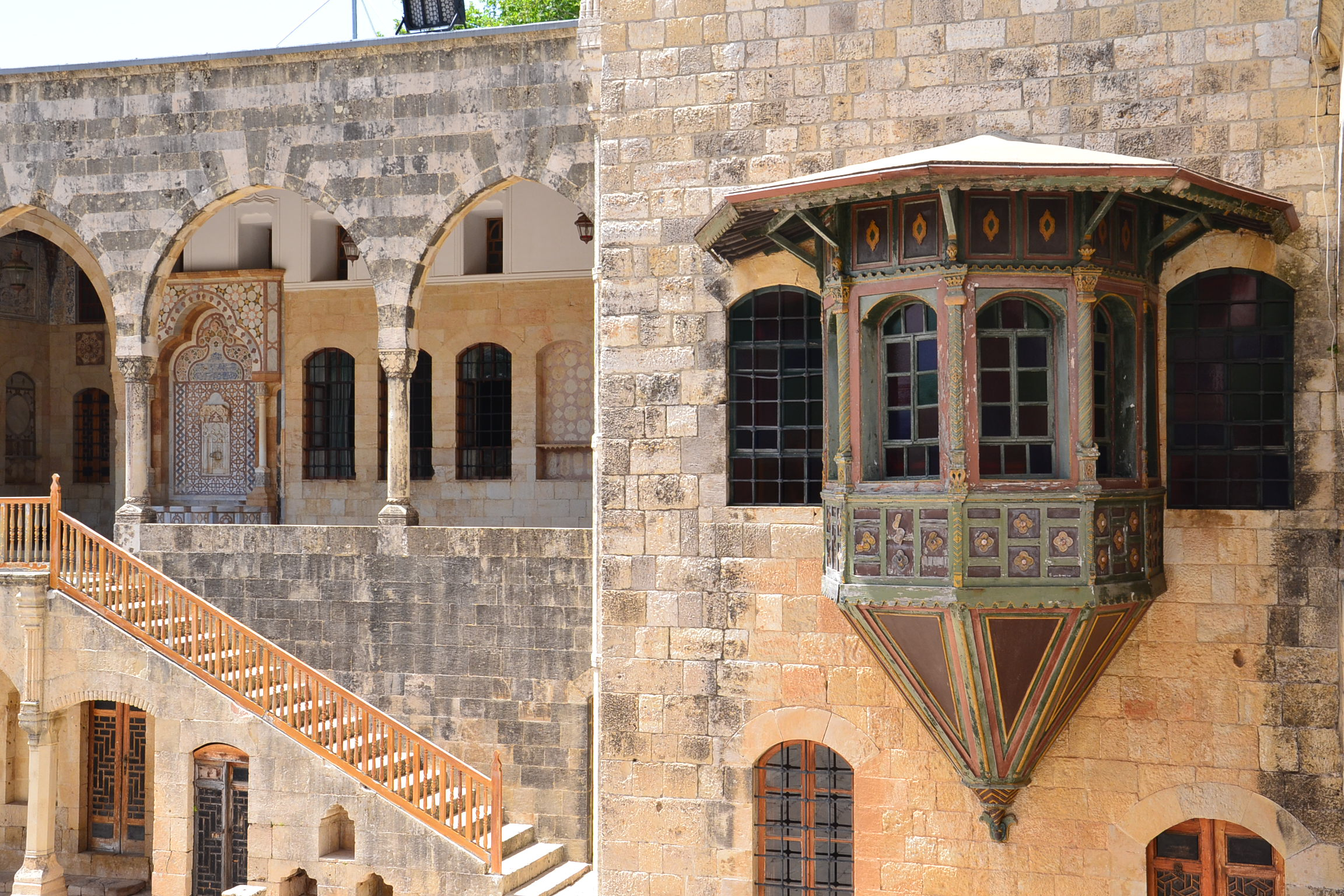 Palais de Beiteddine - Vue d'un salon